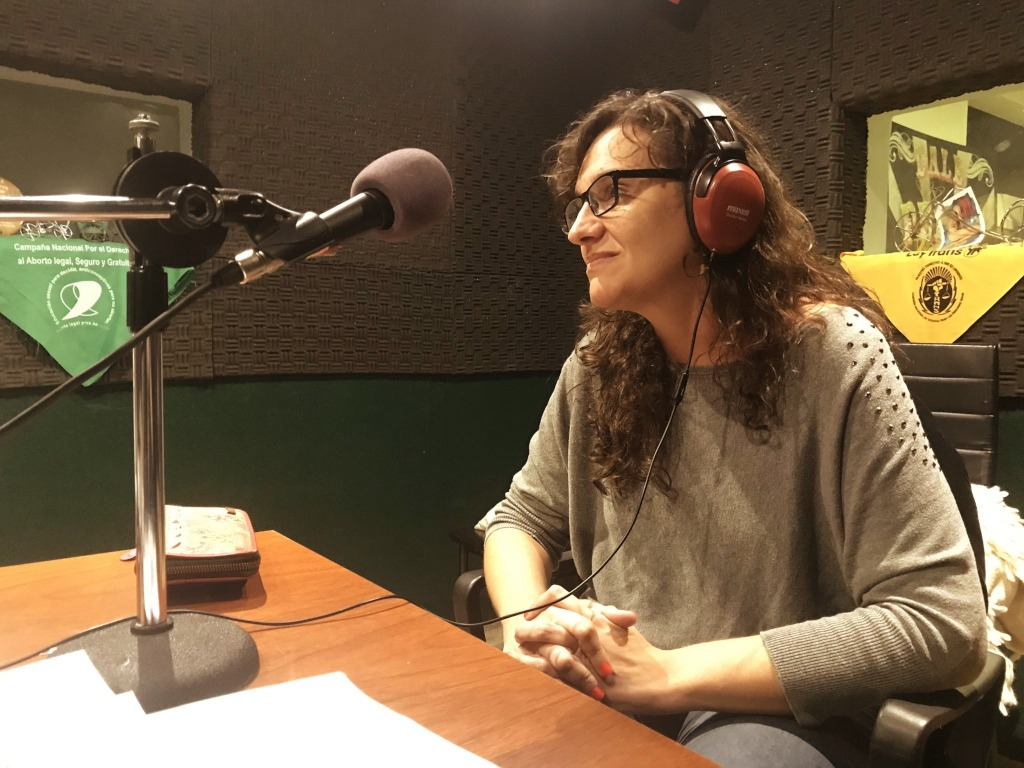 Soledad Castro Lazaroff, cineasta, escritora, docente y murguista uruguaya, en el programa "Hola Mabel" de Radio Pedal. Montevideo, 21 de marzo de 2019.